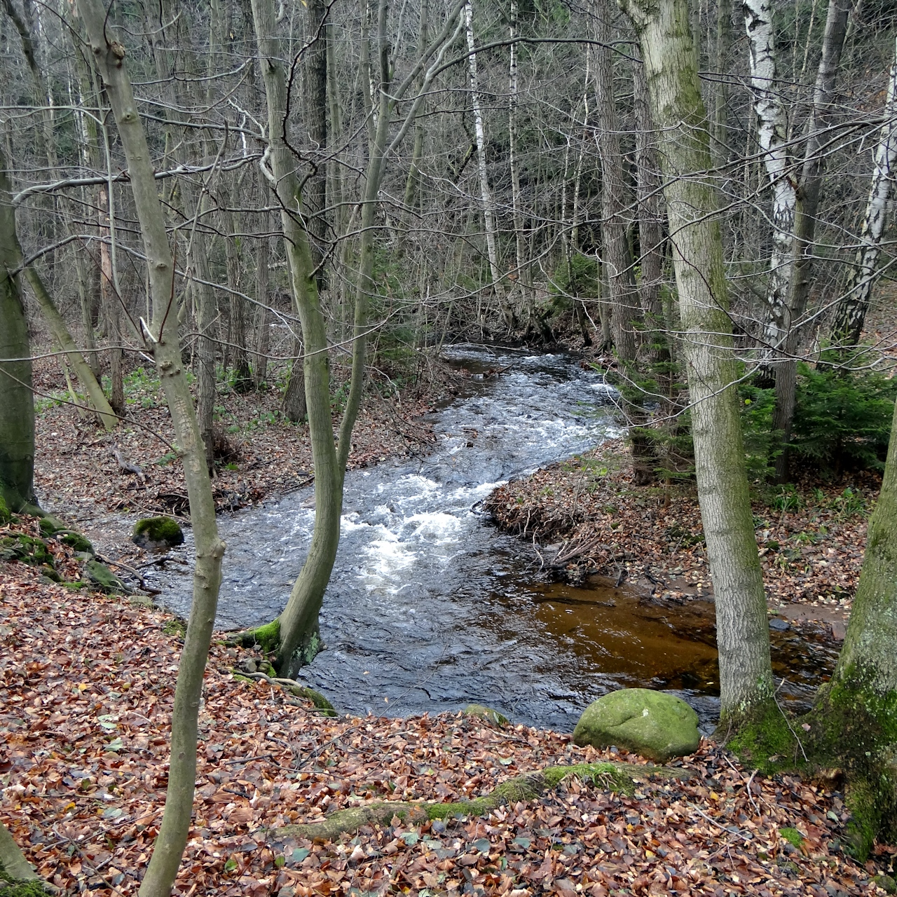 Ecker im mittleren Eckertal bei Stapelburg.